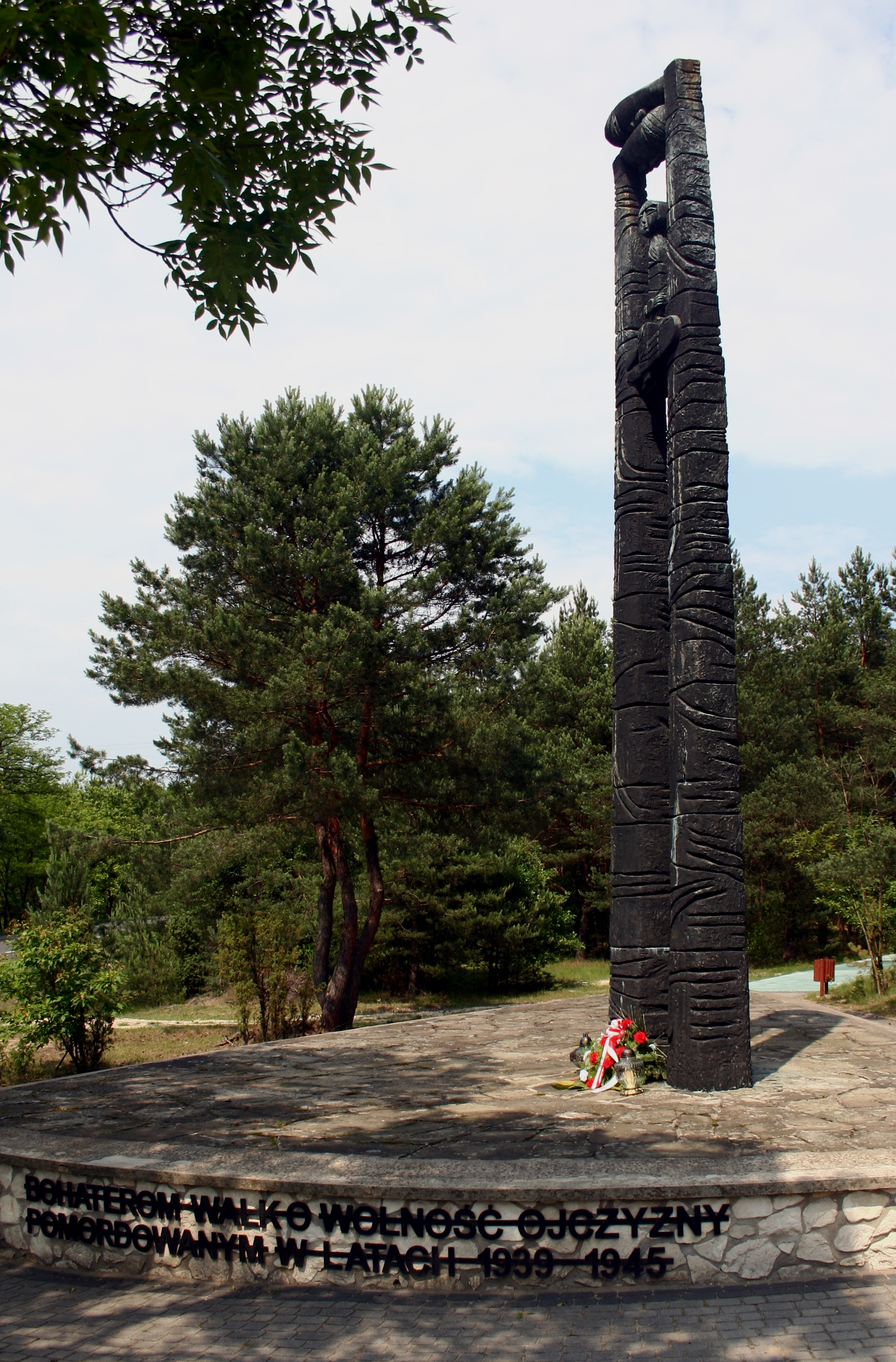 Pomnik ku czci pomordowanych w czasie II wojny światowej w pobliżu cmenatrza w Olsztnynie przy drodze do Kusiąt, woj. śląskie